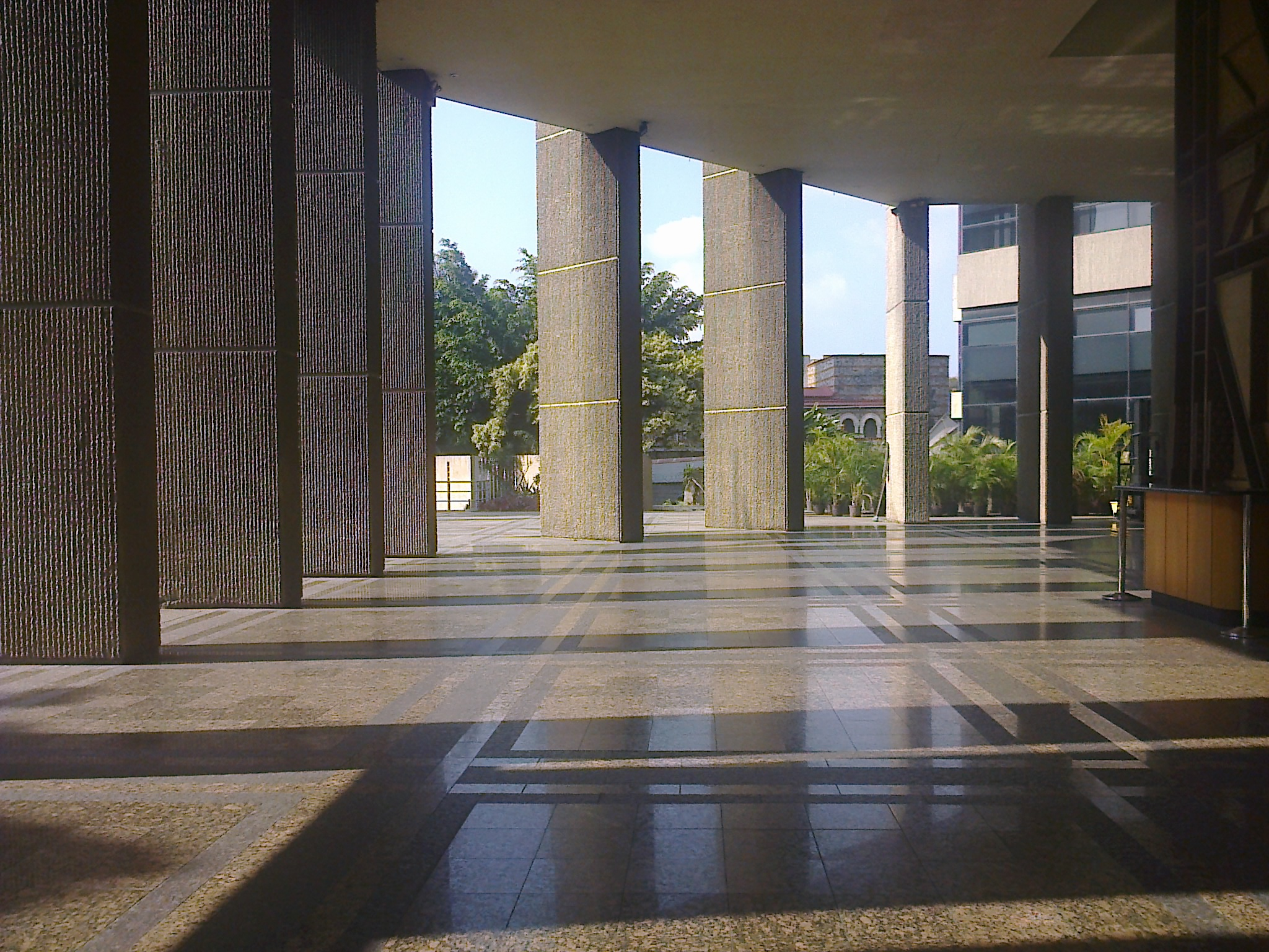 Espacios Abiertos de el BOD Centro Cultural. Plaza La Castellana Venezuela